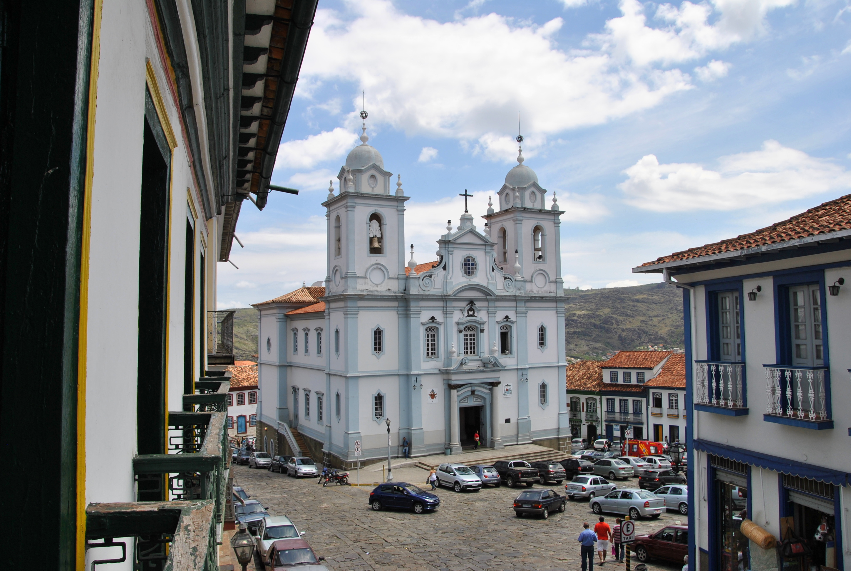 Diamantina (MG), Brazil.